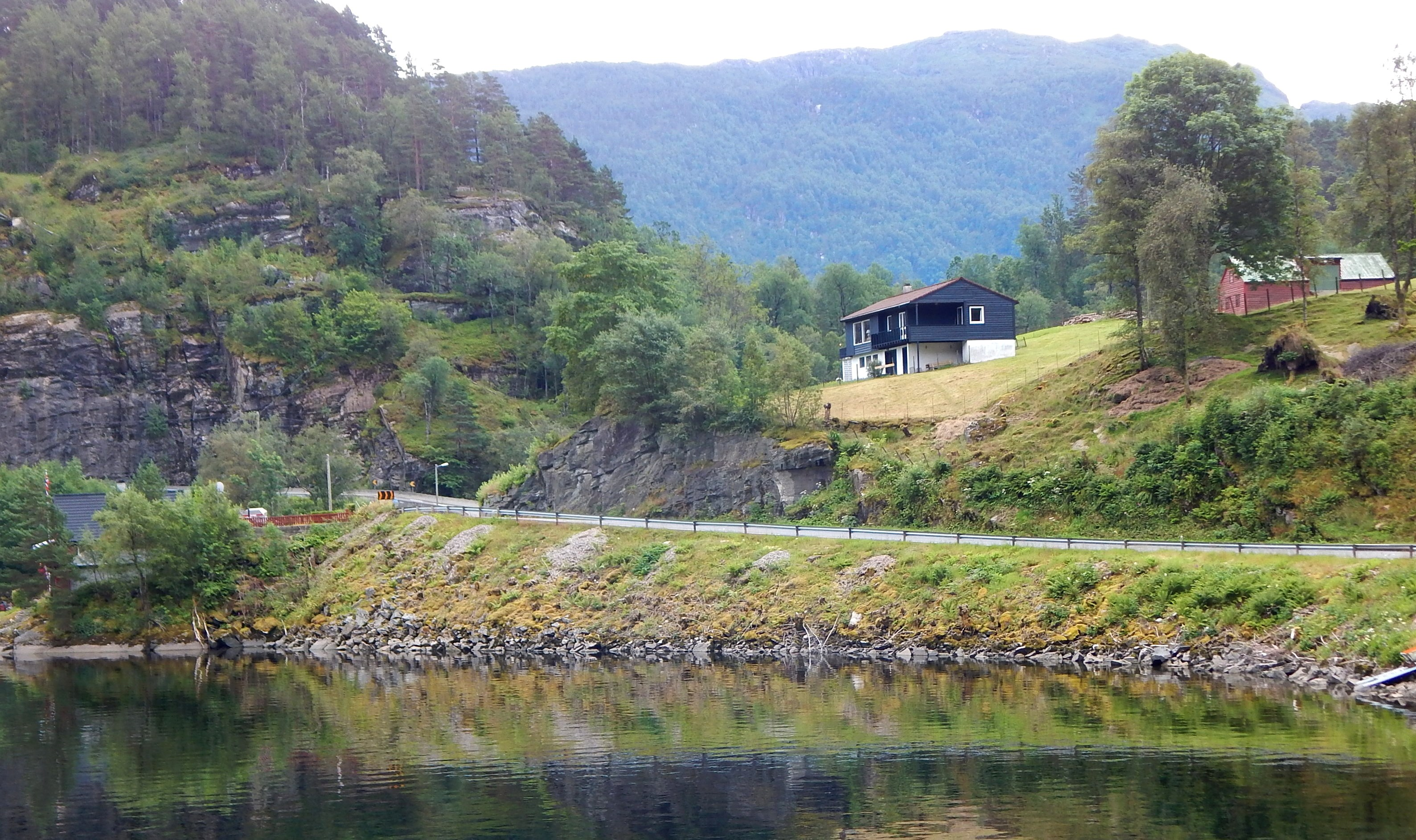 Skogseidvatnet i Bjørnafjorden kommune (tidligere Fusa), like inntil Hålandsdalsvegen (fylkesvei 48)